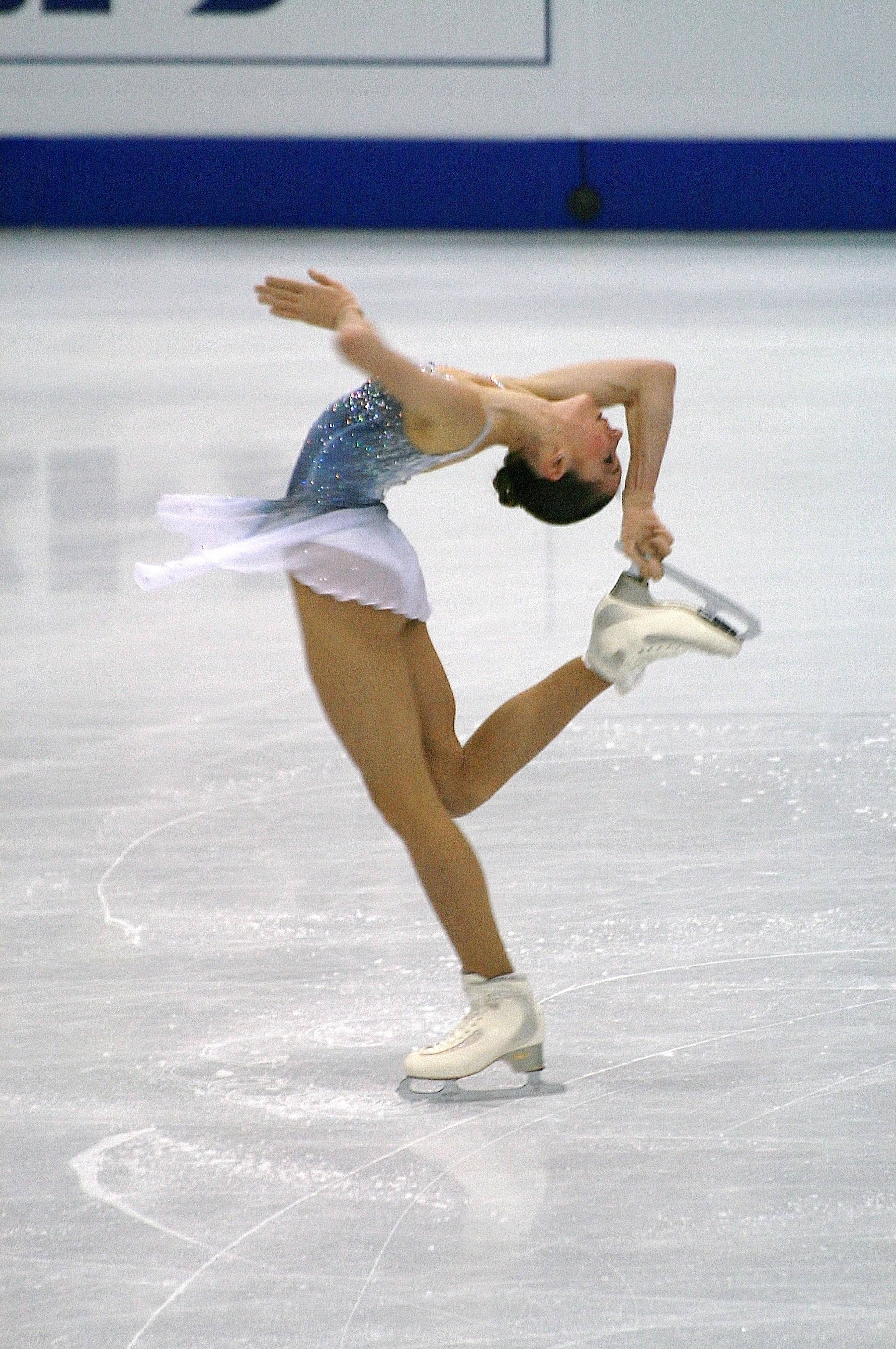 Полина Коробейникова (Россия) на чемпионате мира поф игурному катанию 2012